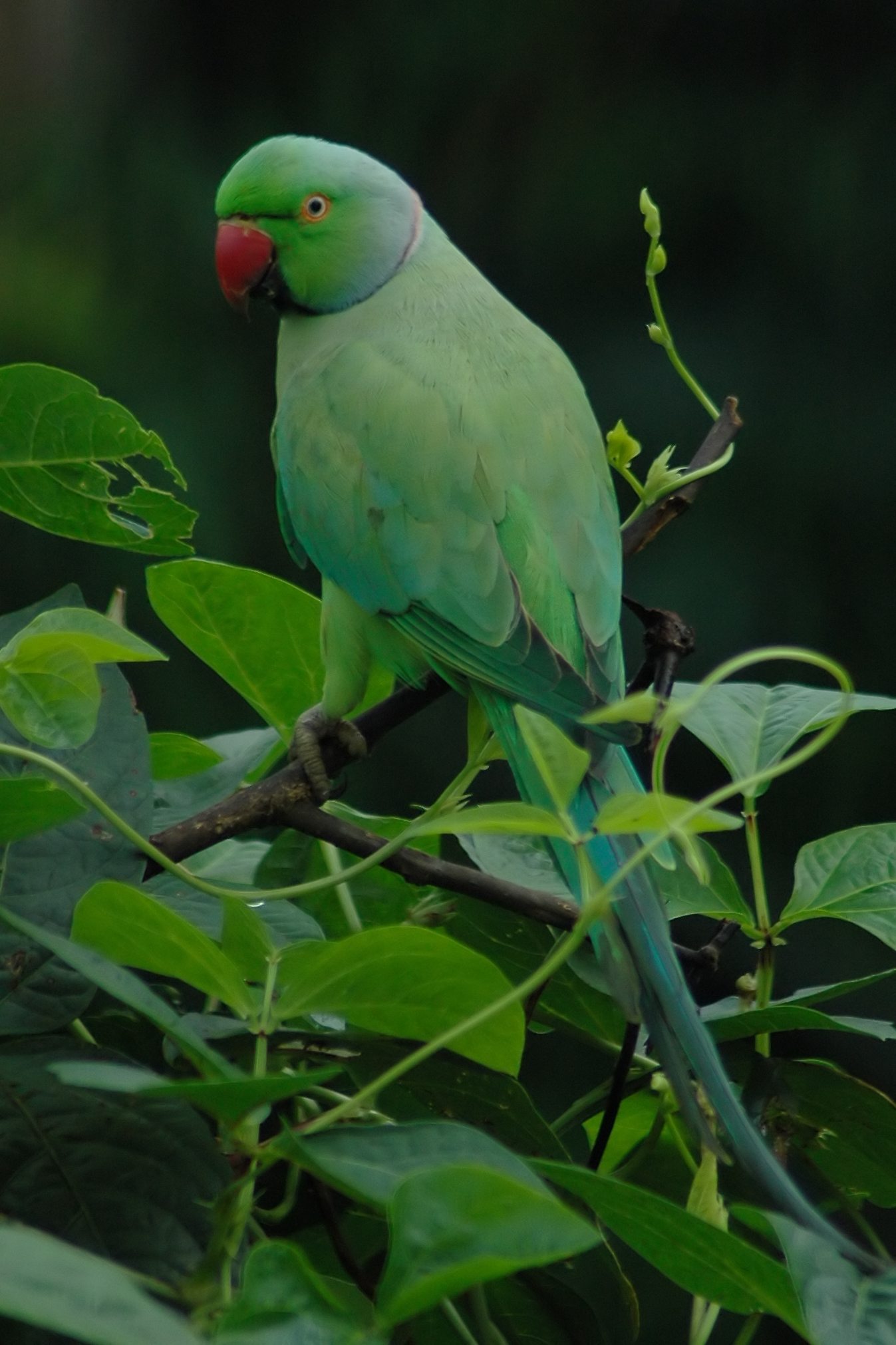 Rose-ringed Parakeet found in Karkala, Karnataka, India.